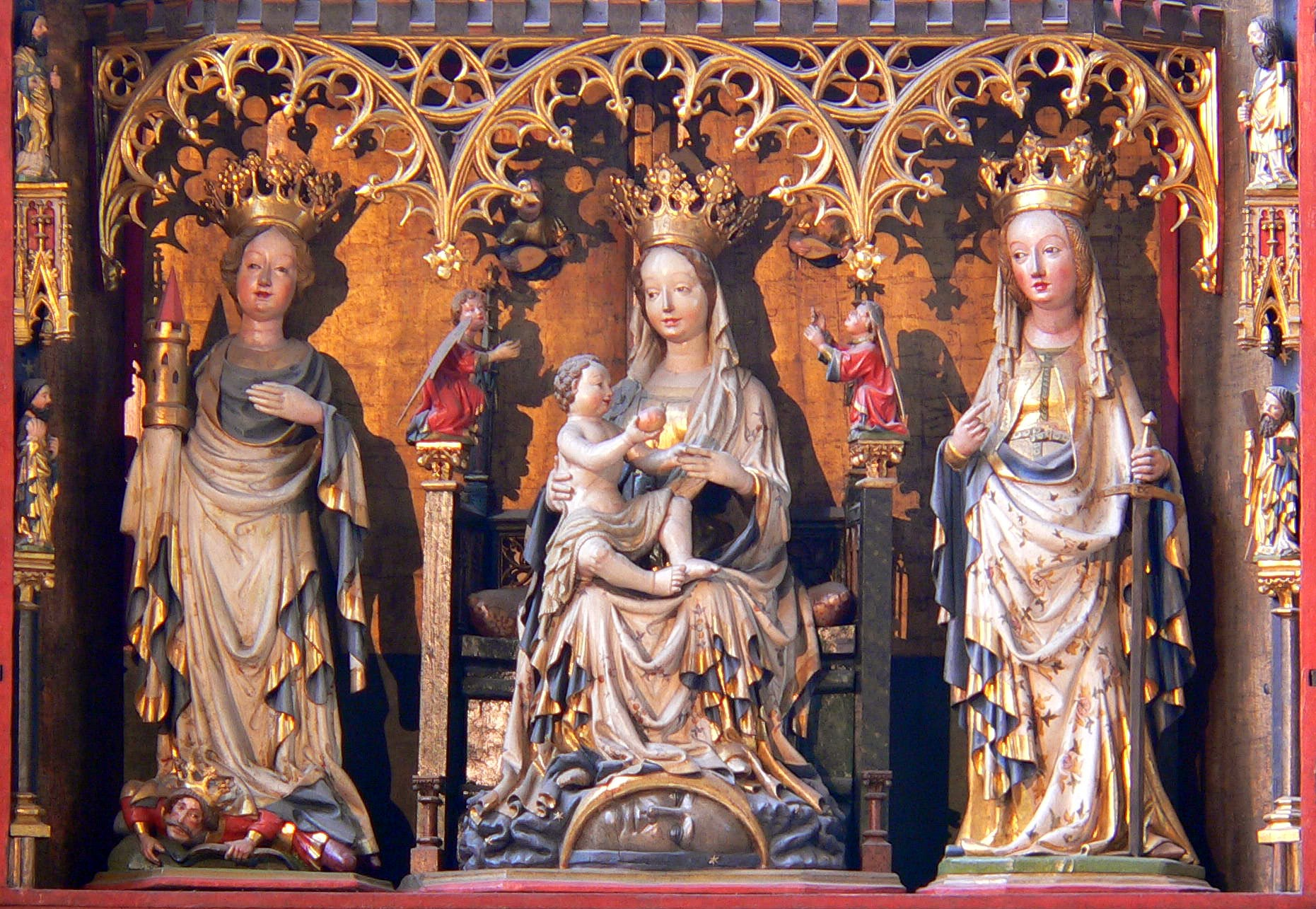 Der Wiener Neustädter Altar im Stephansdom, Wien - Detailaufnahme Schrein unten (von links): Barbara von Nikomedien, Maria mit Kind, Katharina von Alexandrien